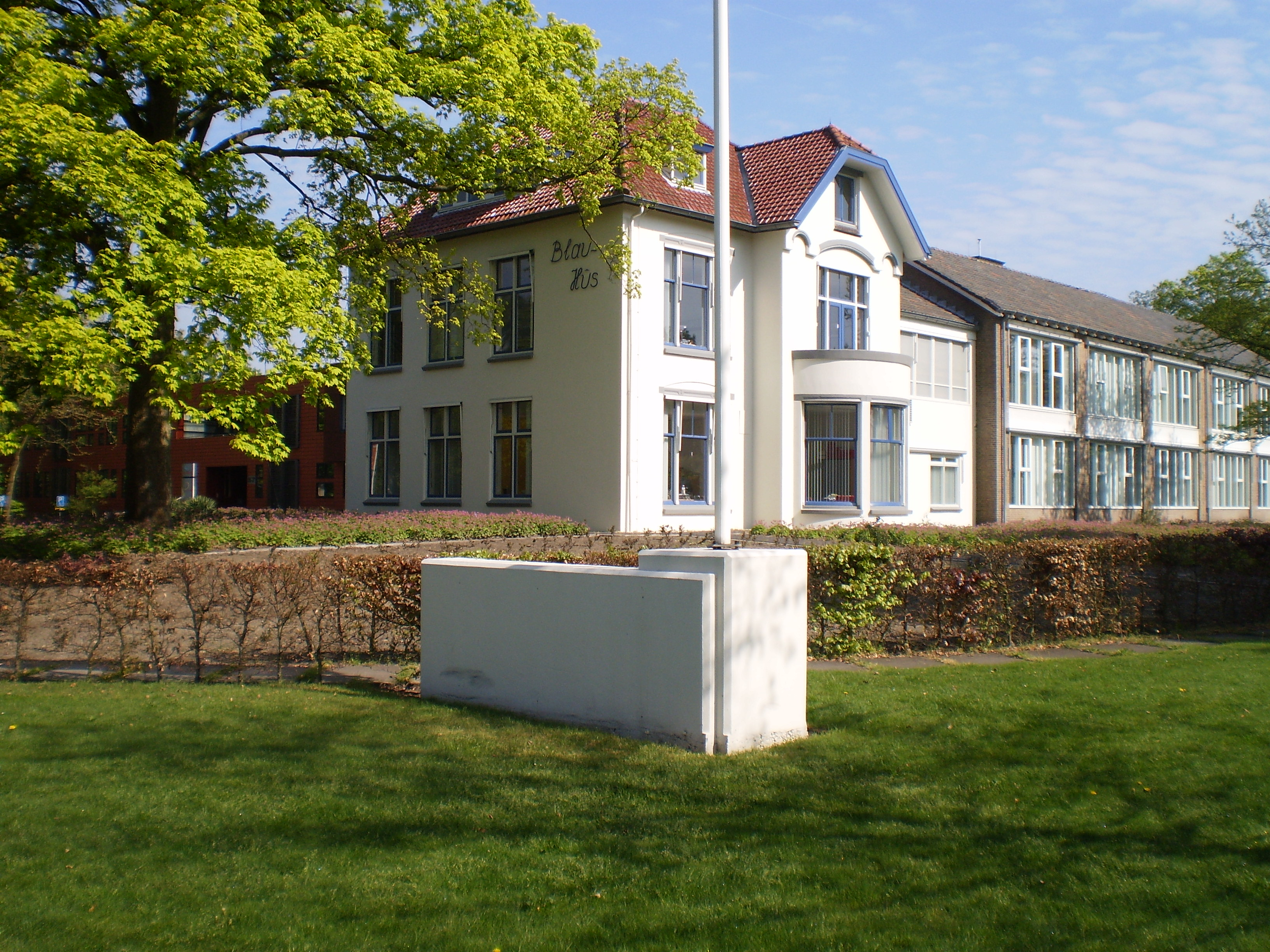 Blau Hûs